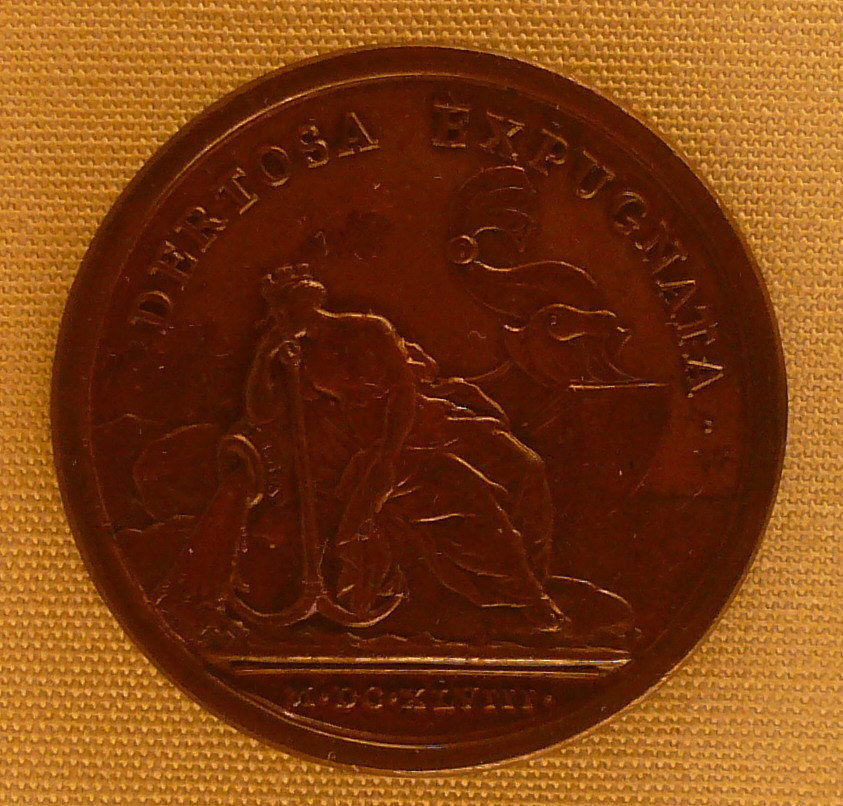 Medalla commemorativa. Col·lecció de numísmàtica del Museu Nacional d'Art de Catalunya.